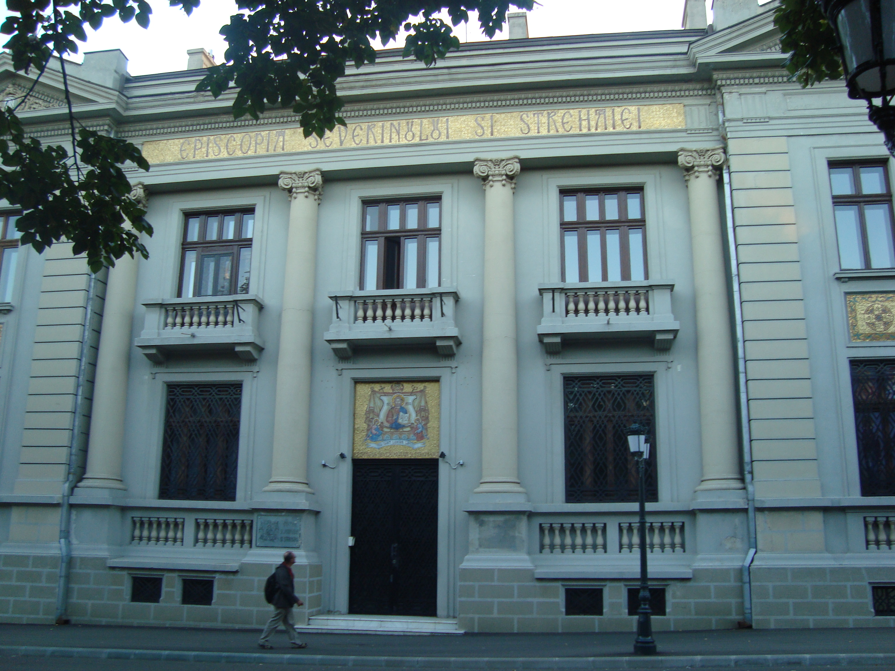 Casa Bibicescu, sediul Episcopiei Severinului și Strehaiei, Str. Gh.Bibicescu nr.6, Drobeta-Turnu Severin